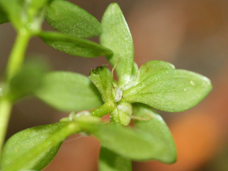 Stumpfkantiger Wasserstern (Callitriche cophocarpa), Detailaufnahme der Klausenfrüchte